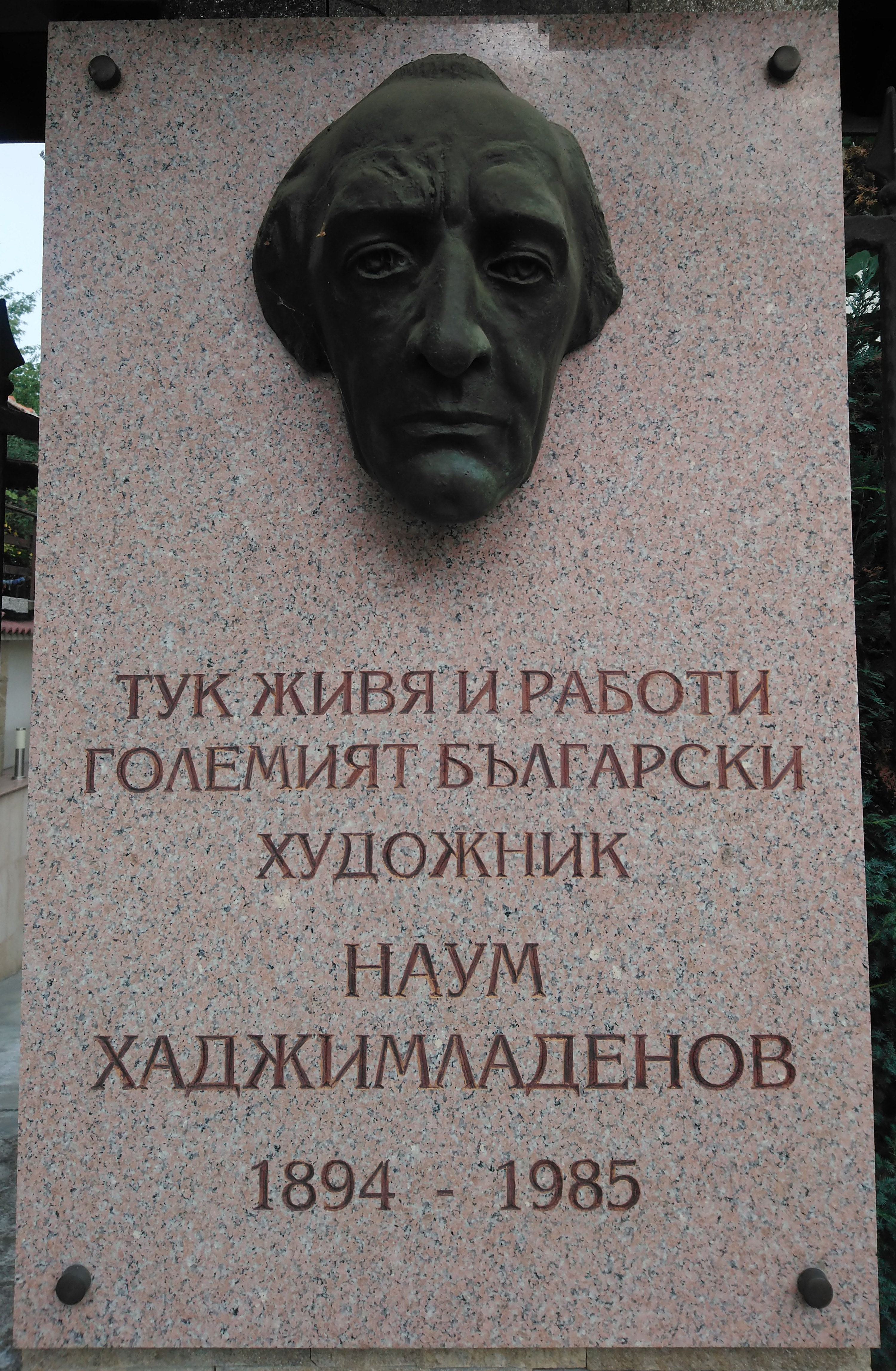 Паметна плоча на художника Наум Хаджимладенов на дома му в град Самоков